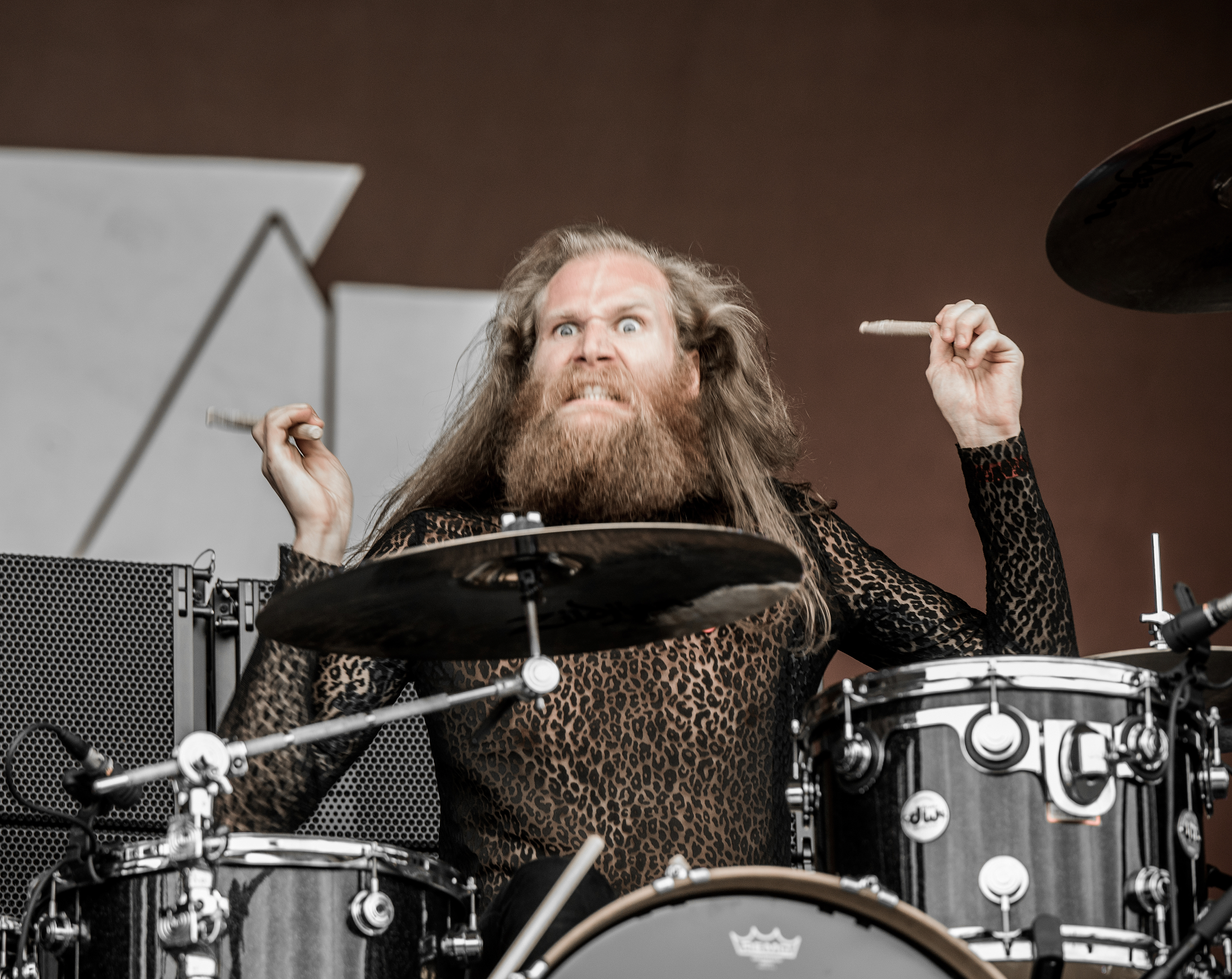 Kadavar beim Wacken Open Air 2017